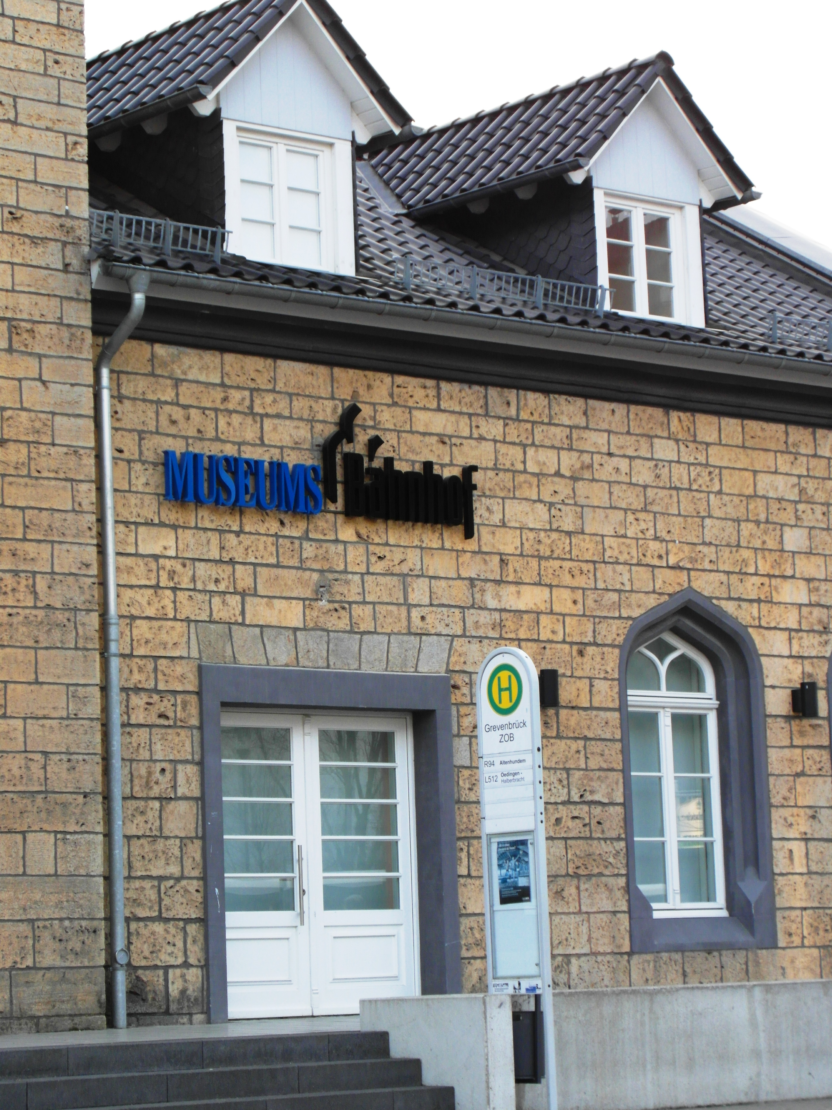 renovierter Bahnhof Grevenbrück, hier Bereich Museumsbahnhof (es existieren noch die Bereiche Essbahnhof (Gastronomie) und Kulturbahnhof (mit Theaterbühne u.a.)